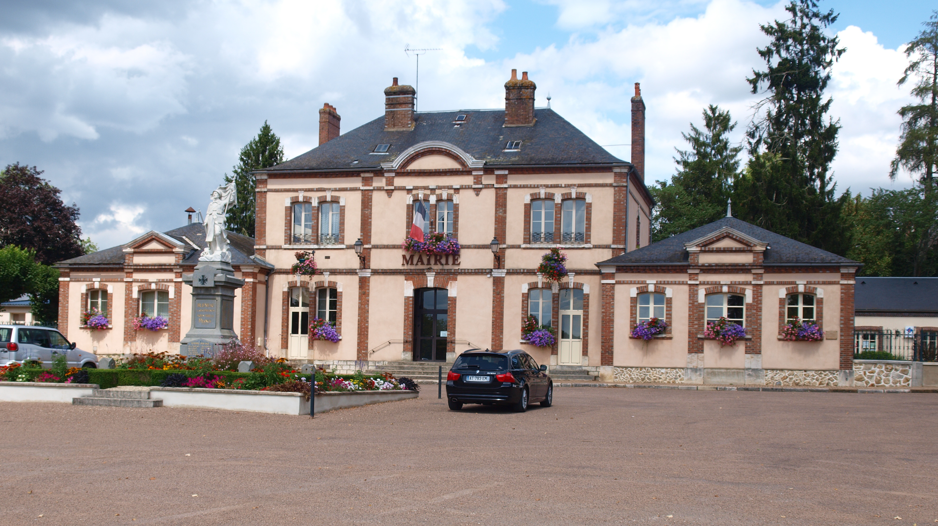 Bléneau (Yonne, France)